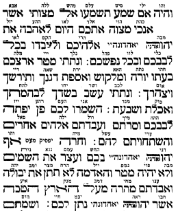 פרשת והיה אם שמוע עם כוונת שם ע"ב על פי האר"י